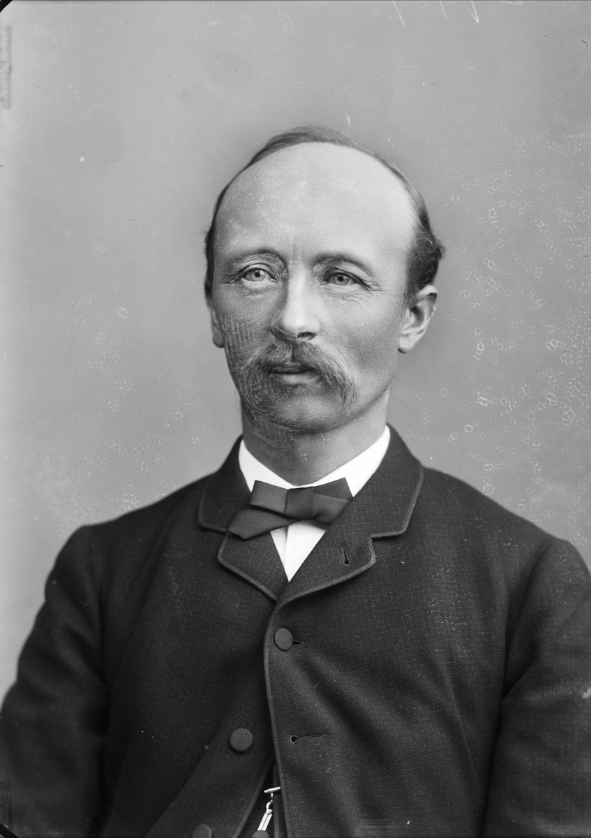 Evald Rygh (født 26. mai 1842 i Verdal, død 9. mai 1913 i Kristiania) var en norsk politiker, tilknyttet partiet Høyre.